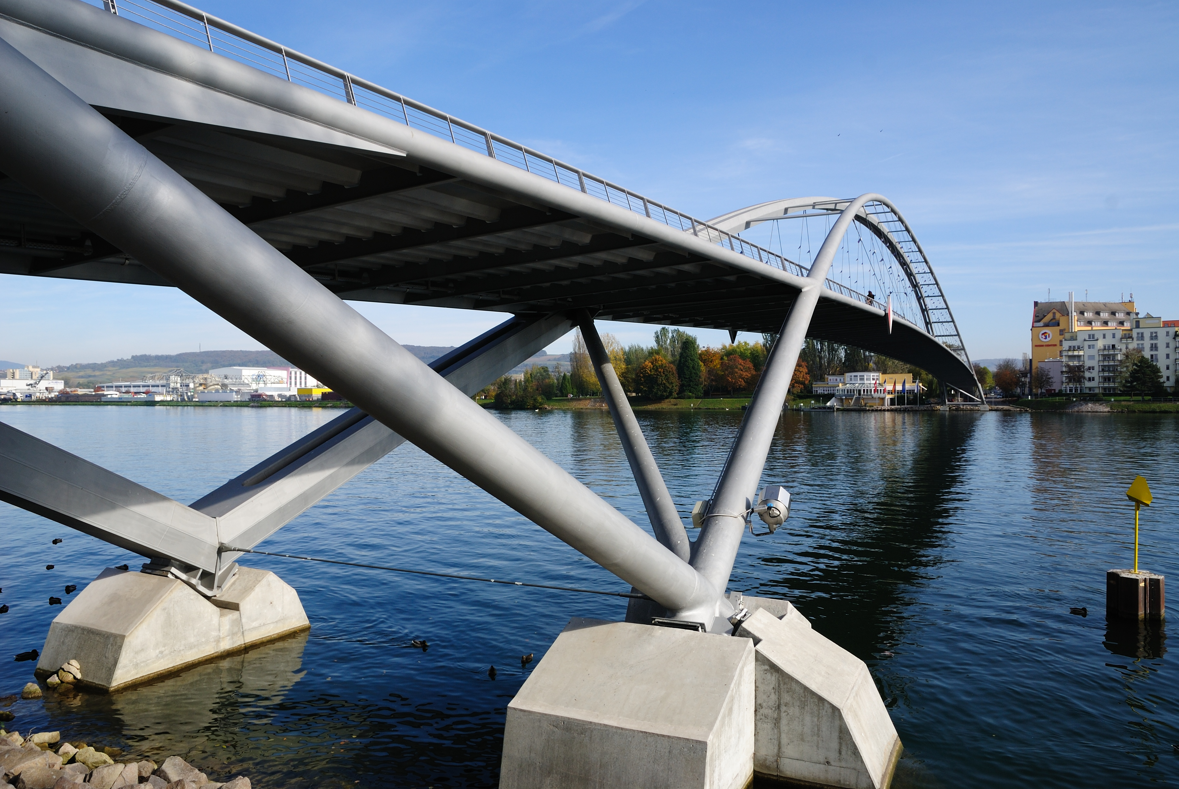 Dreiländerbrücke